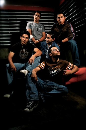 Fotografía del Grupo Jade